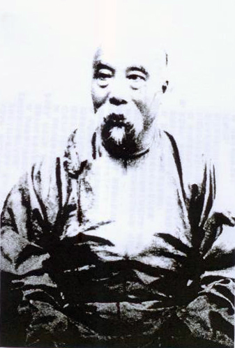 胡燏棻（Hú Yùfēn，音同“玉分”，1840年－1906年），字芸楣，亦作云眉，安徽泗州人，原籍浙江萧山，清末大臣，淮系官僚。